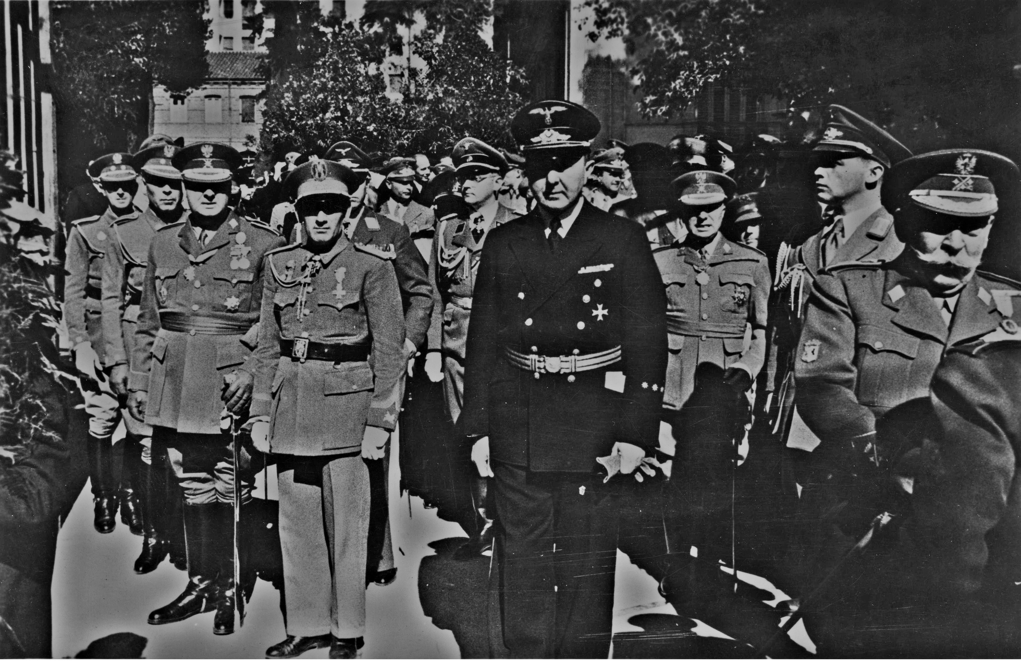 El embajador alemán Hans-Heinrich Dieckhoff (centro), el general Augustín Muñoz Grandes (a la izquierda) y otros oficiales españoles y alemanes en el funeral del agregado militar alemán en Madrid, el Coronel von Otzen.